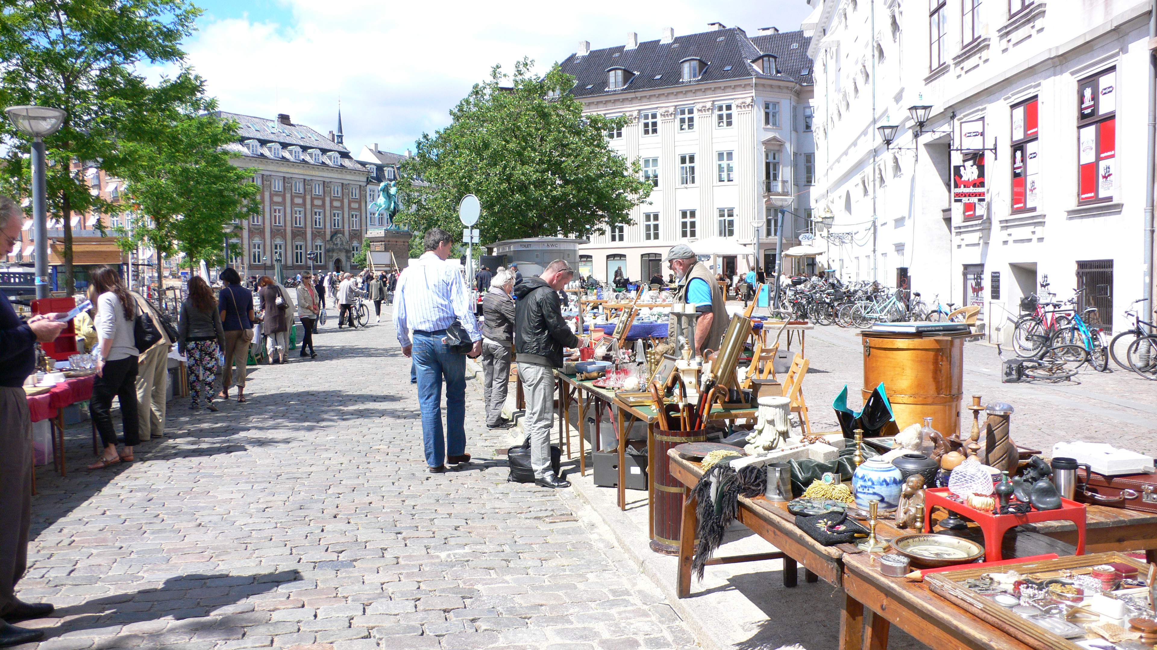 A flee market at Ved Stranden in central Copenhagen, Denmark